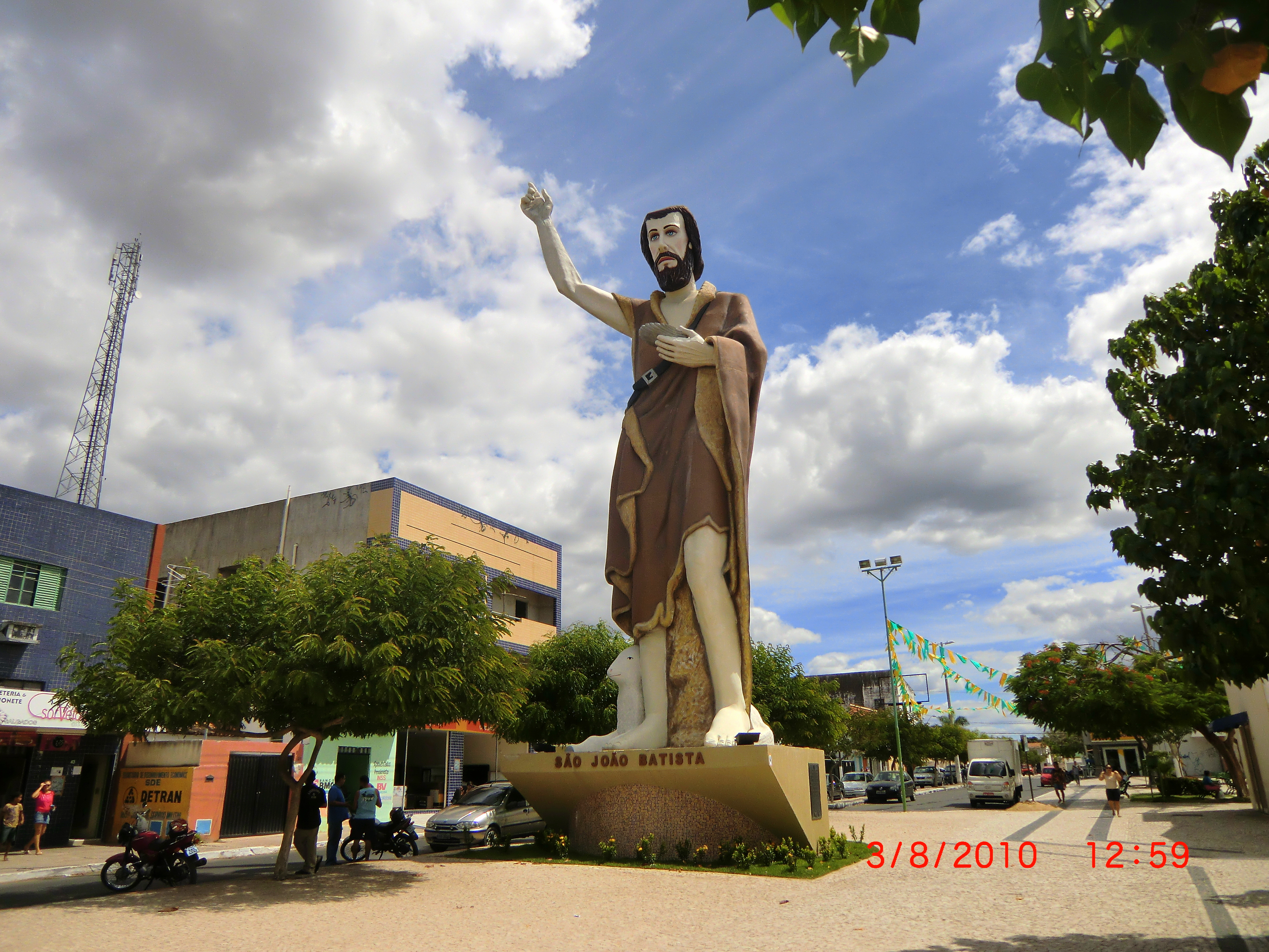 Estátua de São João Batista, padroeiro da Paróquia de Horizonte - CE (Festa: 24/6)